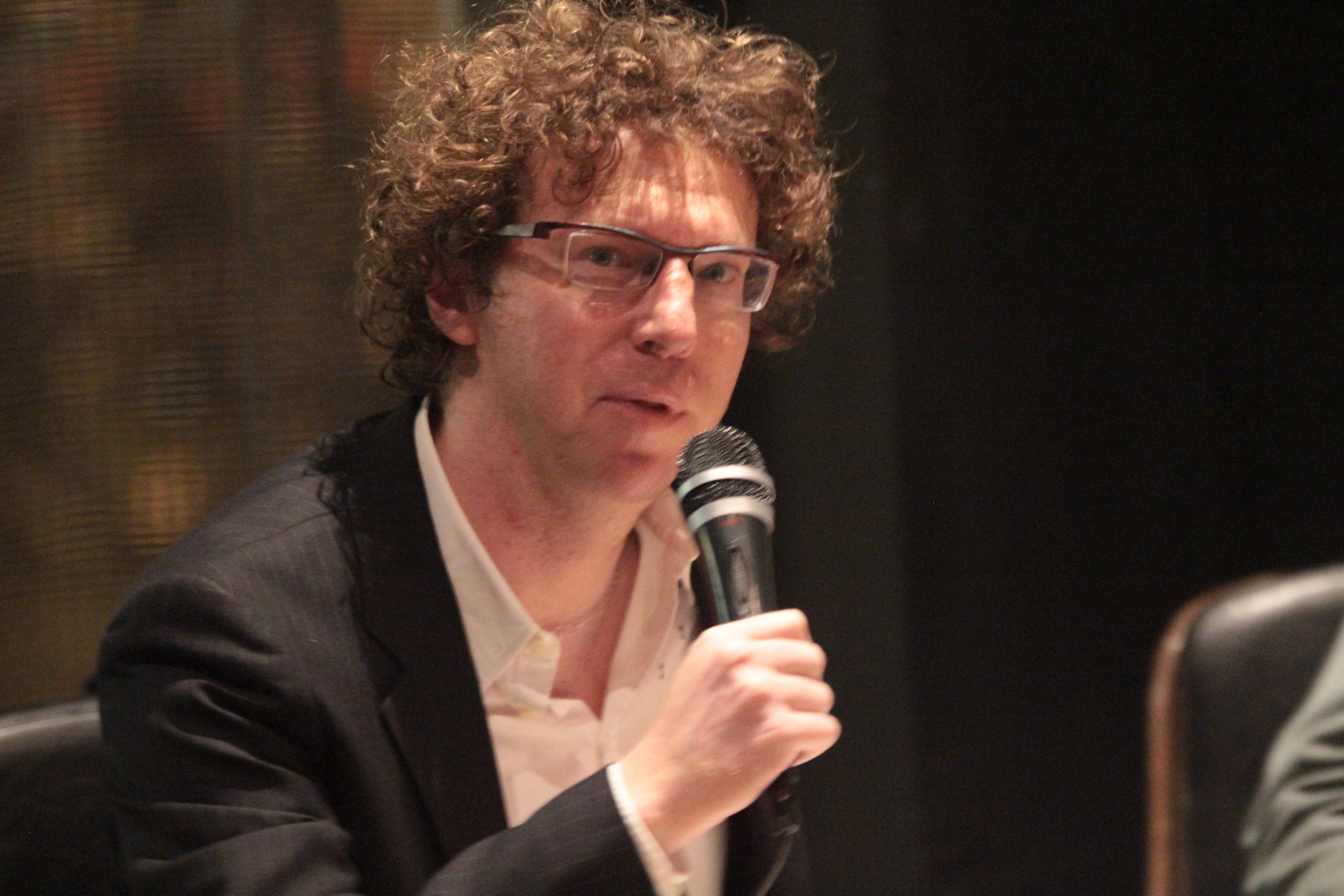 De schrijver Arnon Grunberg, tijdens een avond met de Amerikaanse cultuurcriticus Eric Jarosinski in hotel V in Amsterdam